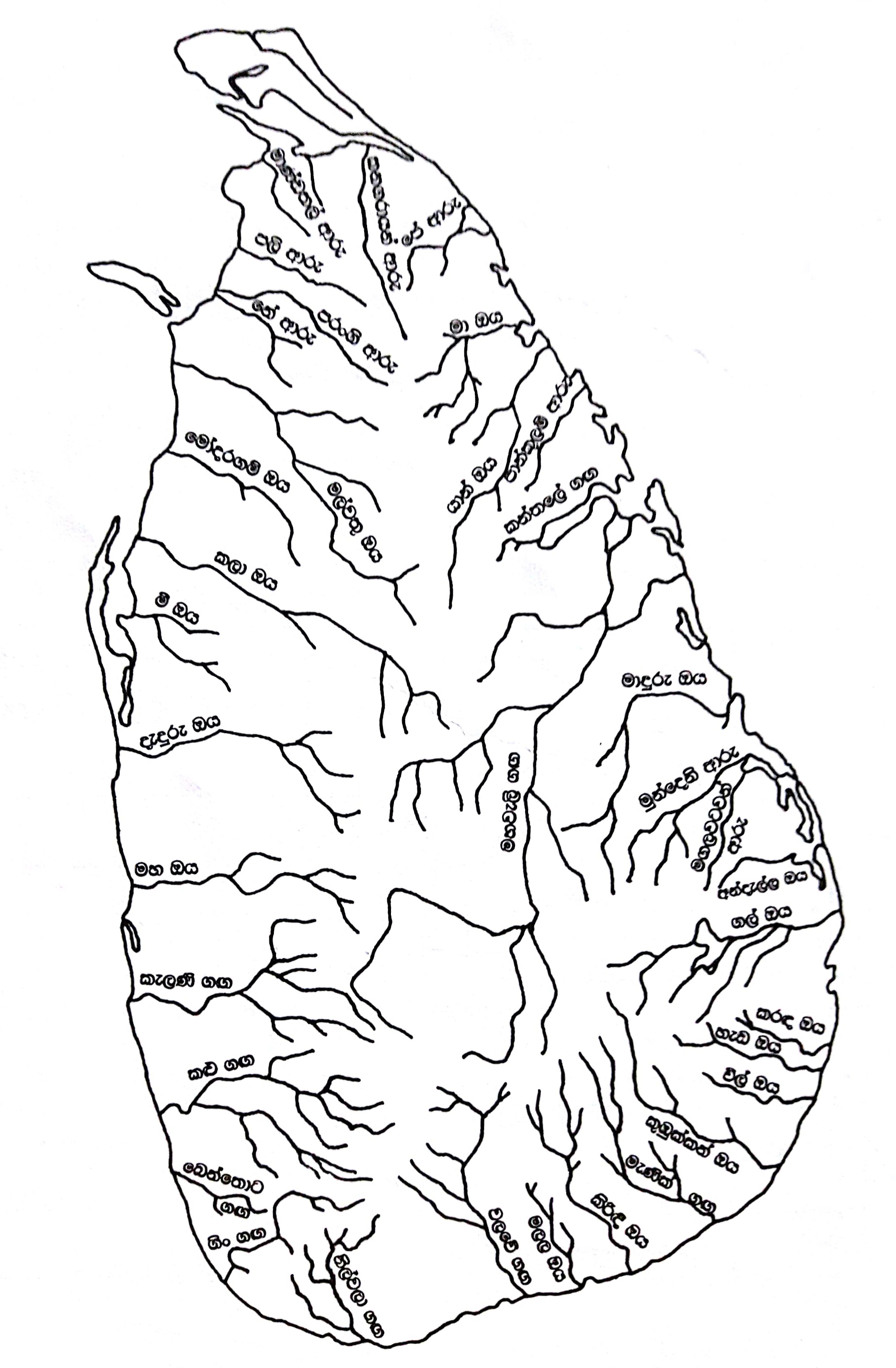 සිංහල: ශ්‍රි ලංකාවේ ගංගා